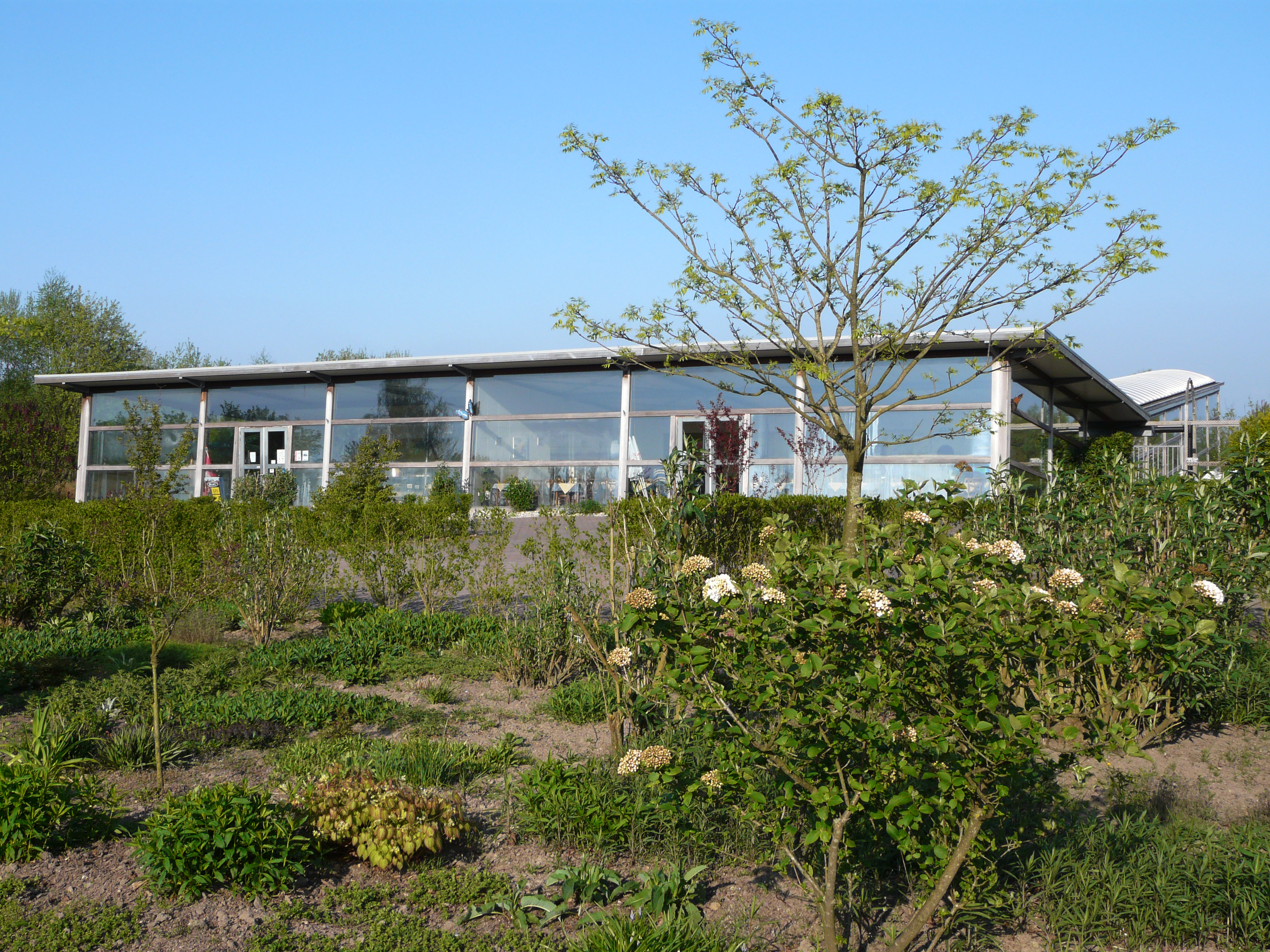 Vlinderparadijs Papiliorama in Havelte